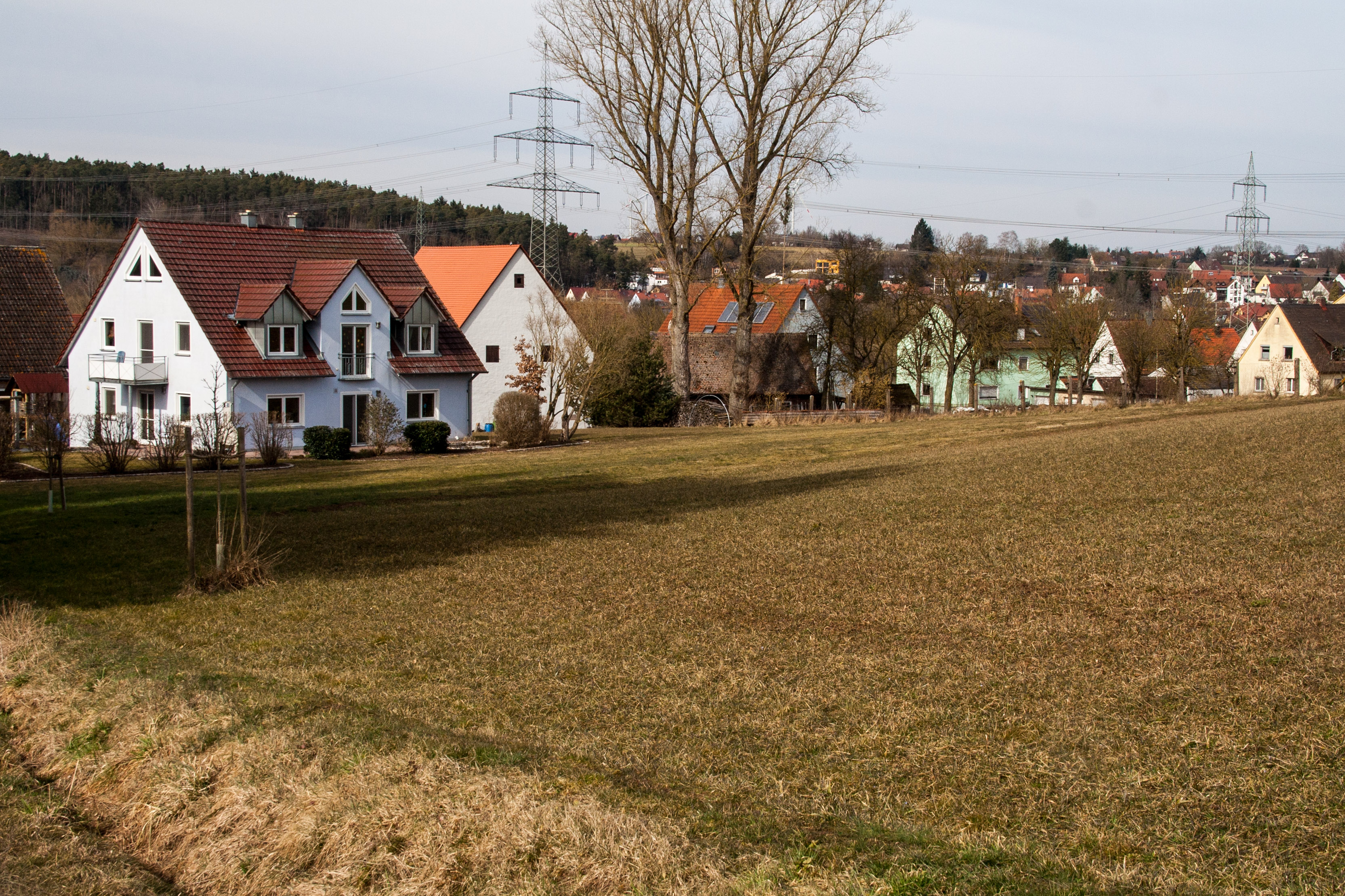 Schwaighausen (Großhabersdorf), Ortsansicht